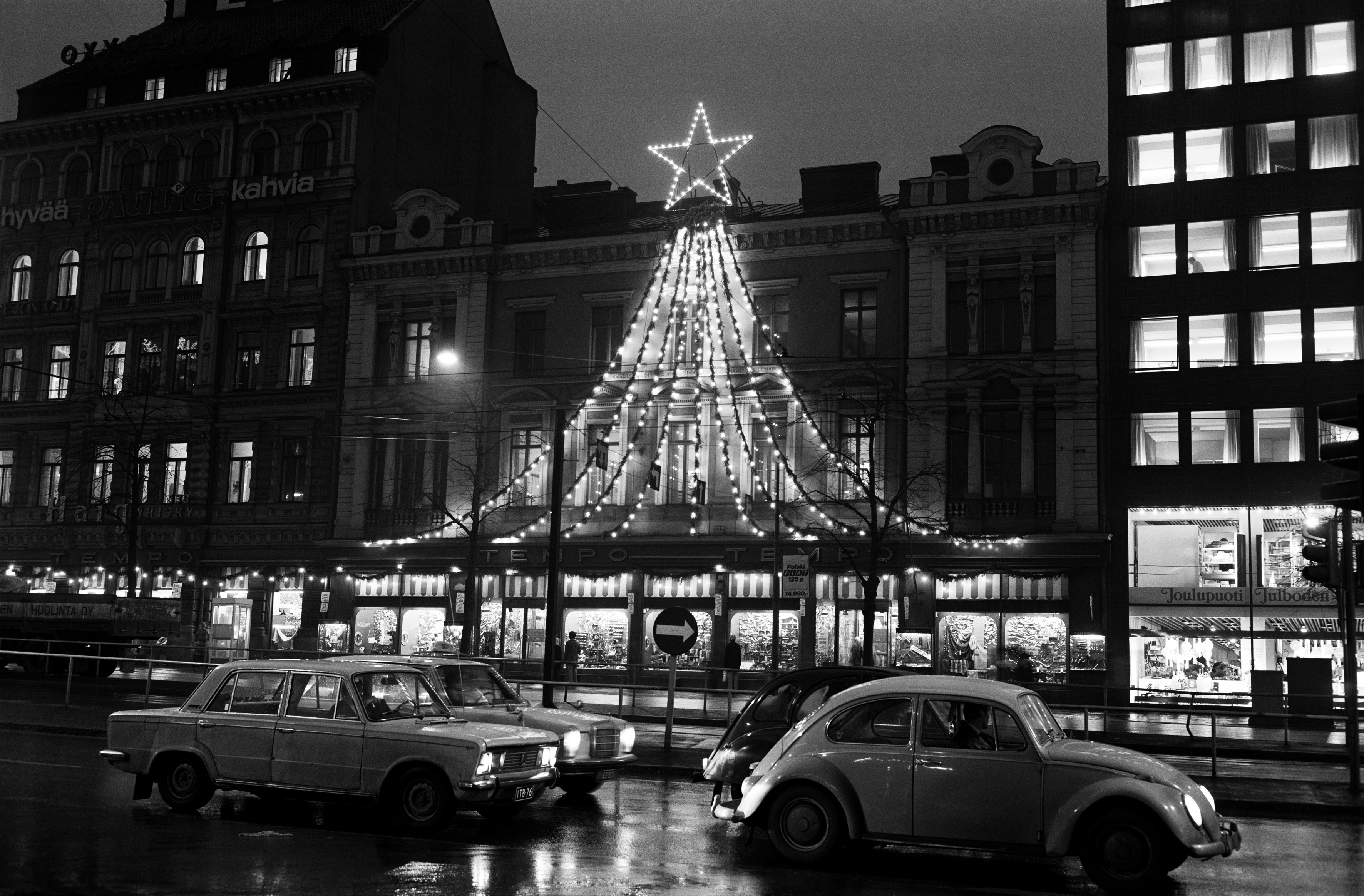 Tempon tavaratalo, Mannerheimintie 2, jouluvalaistuksessa vuonna 1972